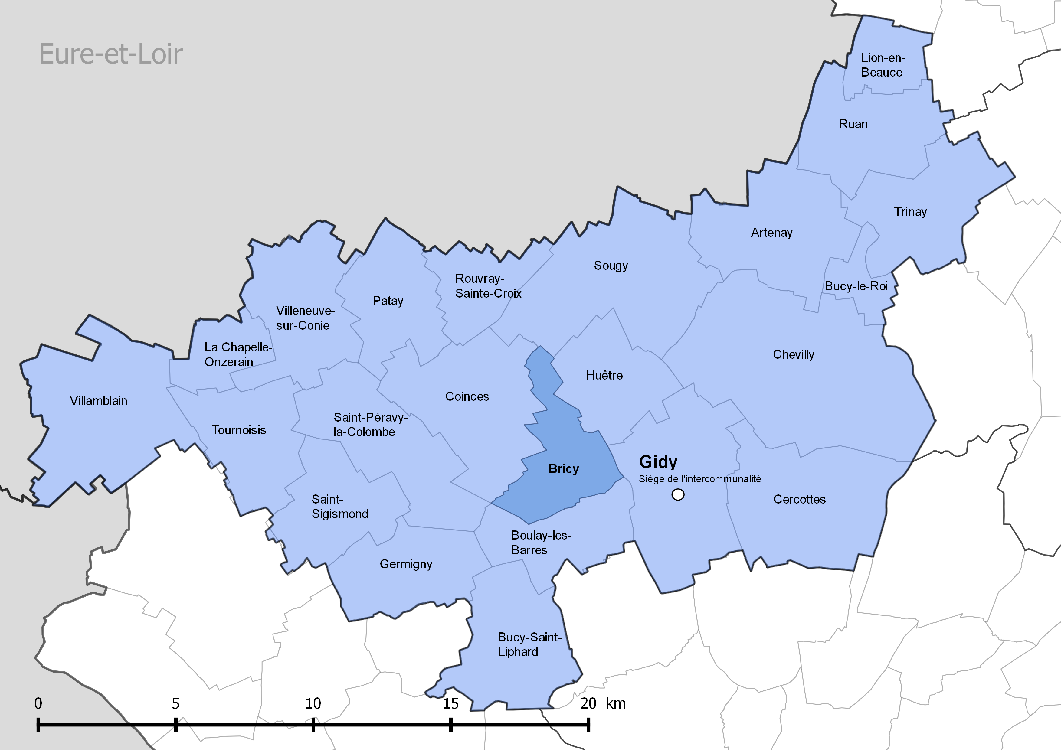 Périmètre de la communauté de communes de la Beauce loirétaine - Situation de la commune de Bricy